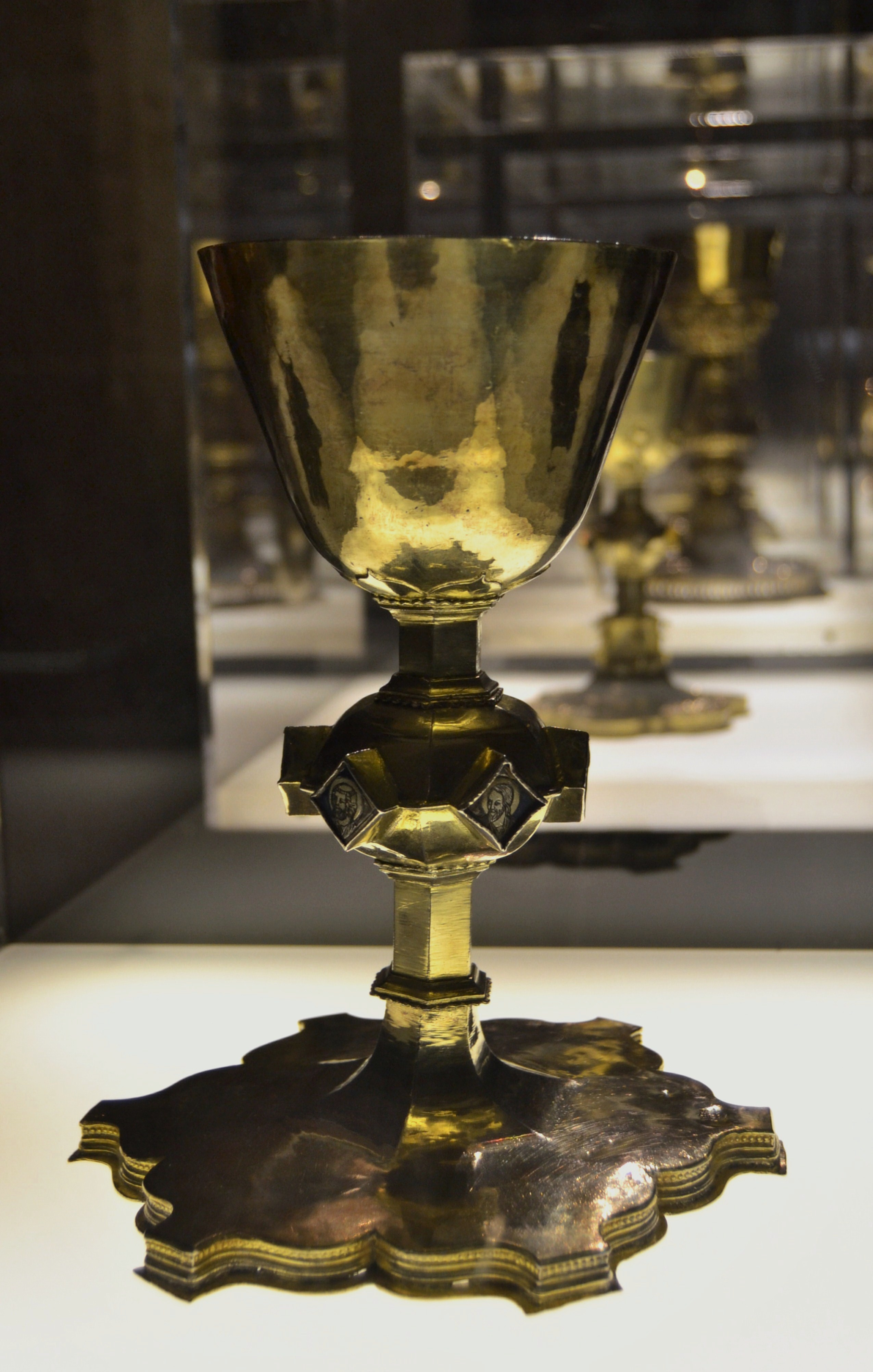 Calze del Papa Benet XIII (Papa Luna), c. 1415, punxó de Sant Mateu, plata daurada a foc, repussada, cisellada i amb fosa. Església de santa Maria de Peníscola.